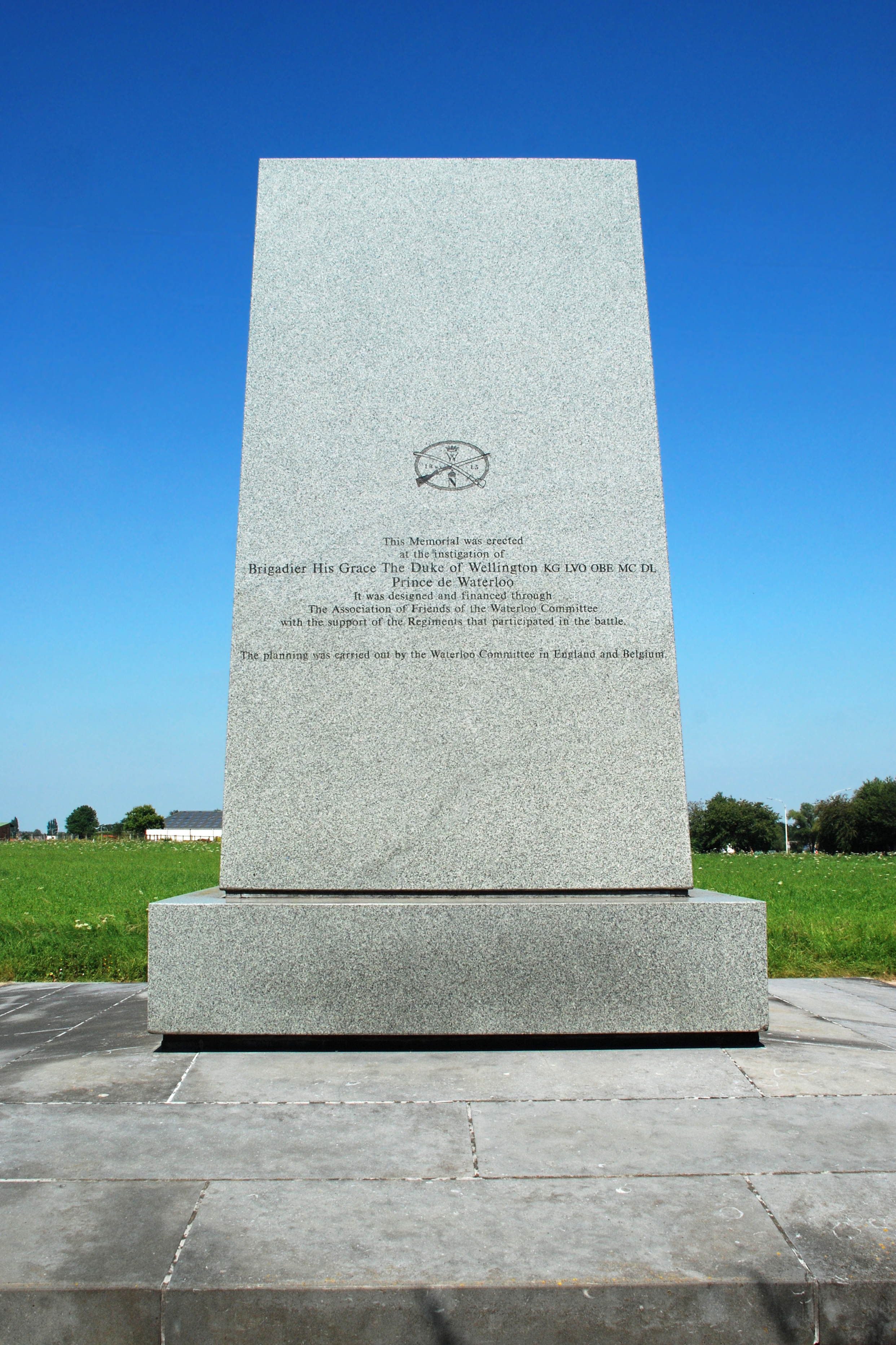 Belgique - Brabant wallon - Genappe - Monument aux troupes britanniques et hanovriennes